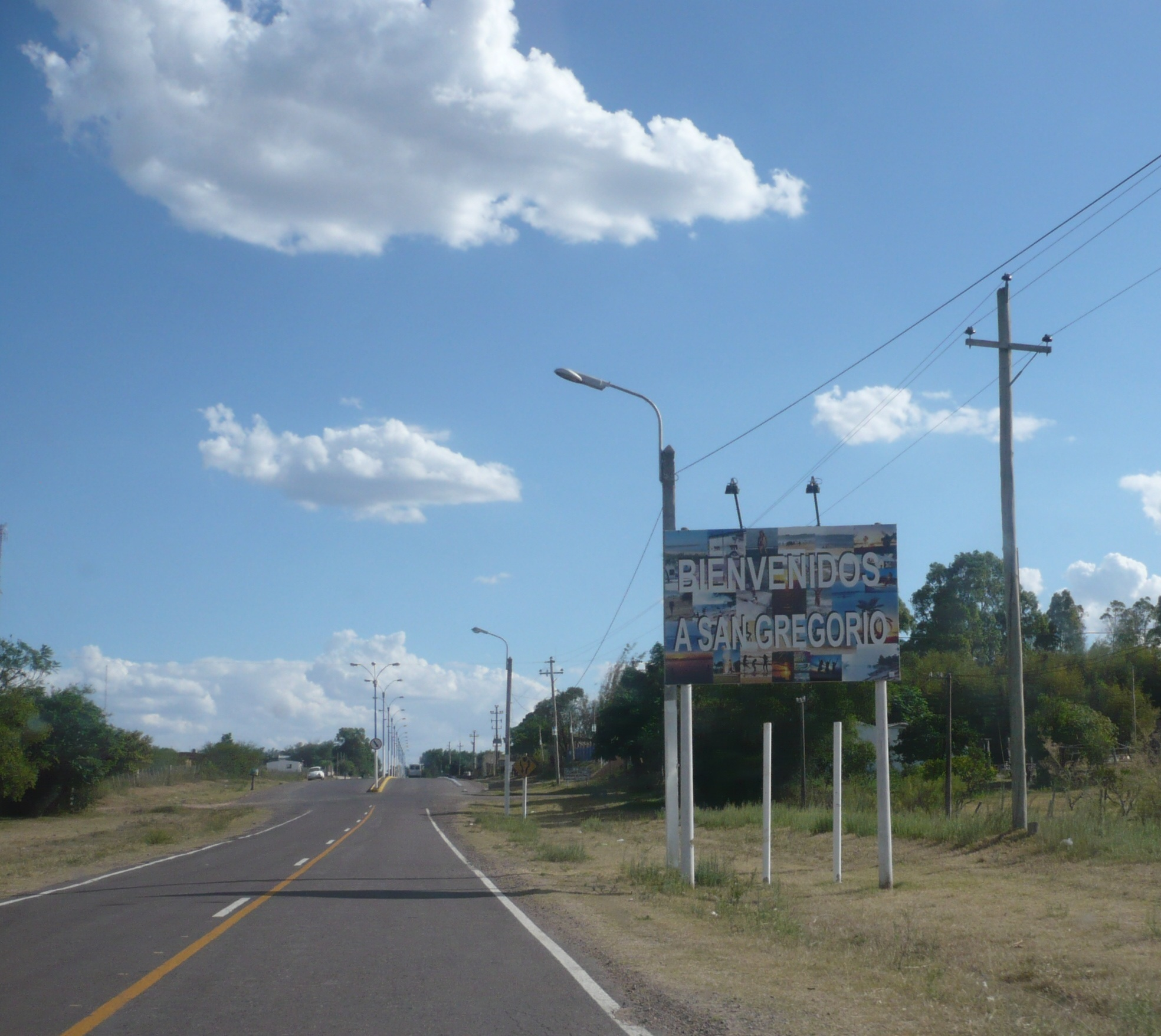 Ruta 43, de acceso a San Gregorio de Polanco.